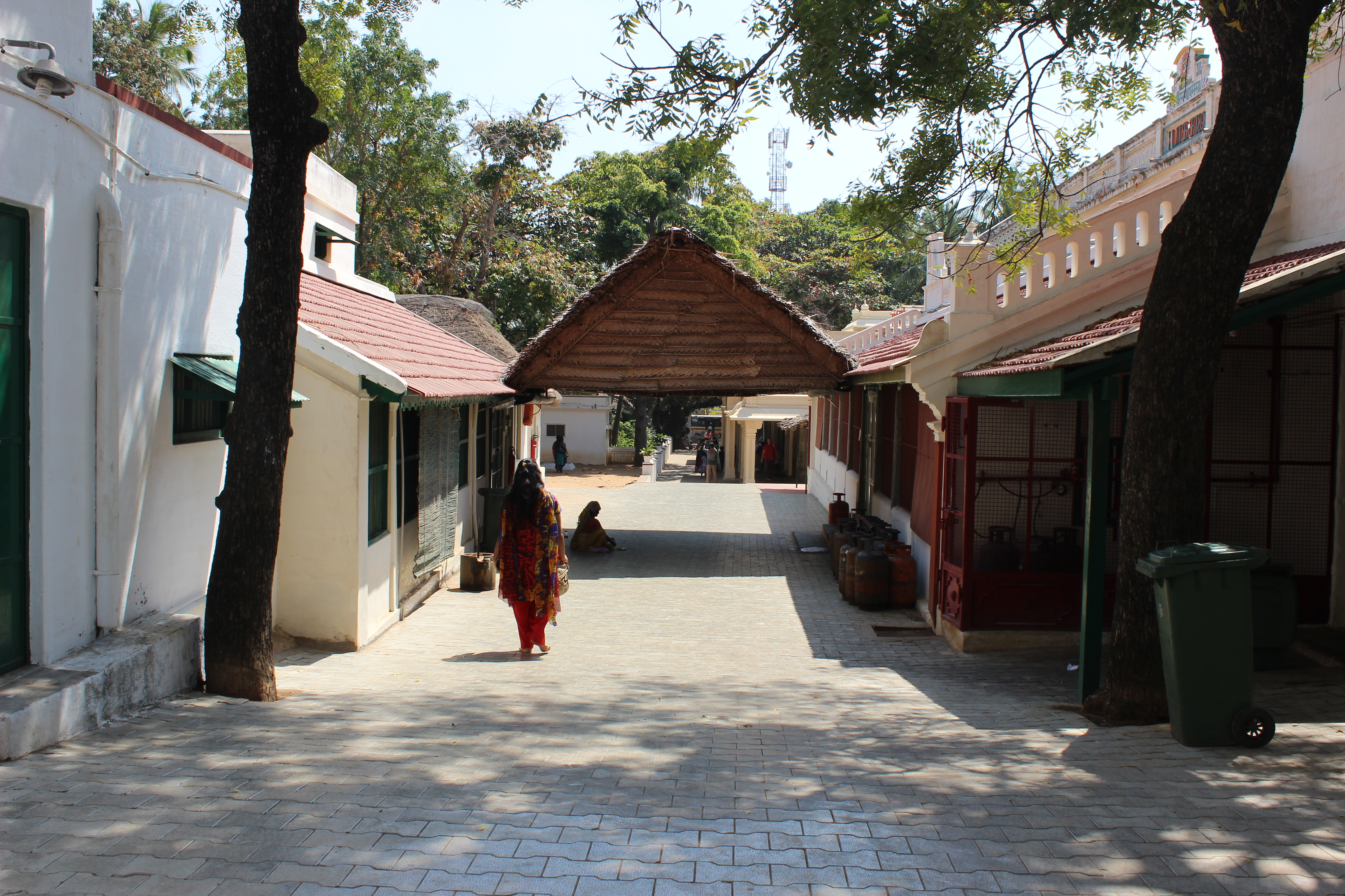 இரமண மகரிசி, ஆசிரமம்,திருவண்ணாமலை